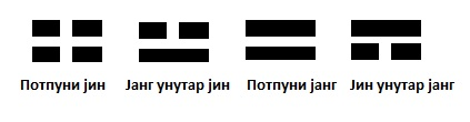 Српски (ћирилица): четири фазе јина и јанга